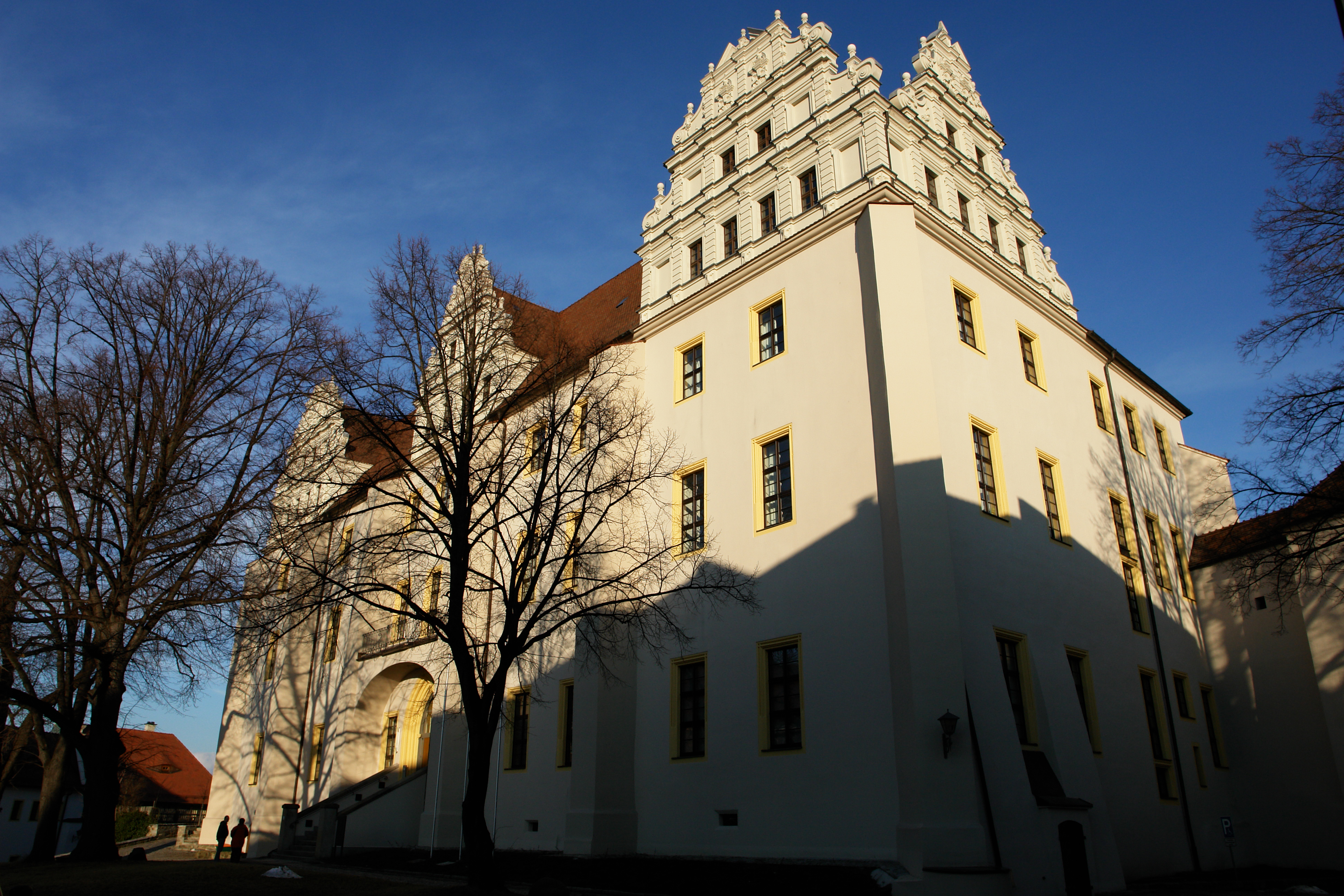 Ortenburg in Bautzen. Hornjoserbsce: Budyski hród.